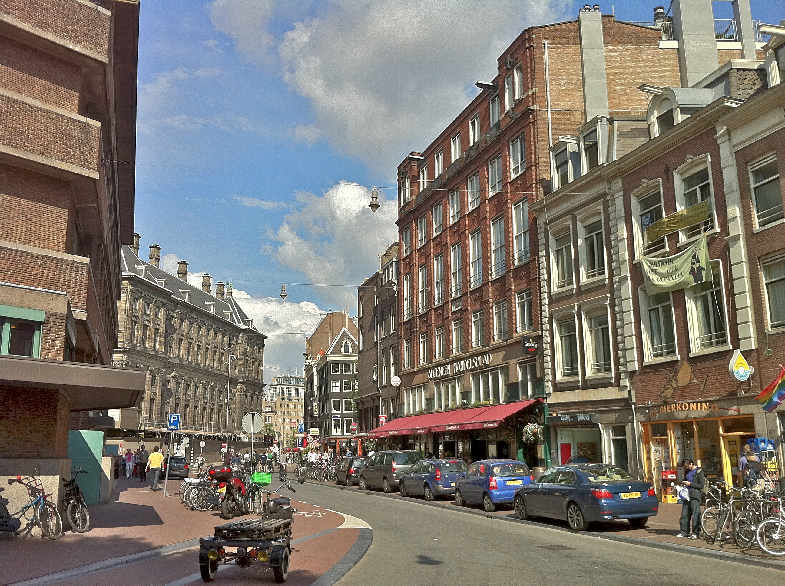 Complex waar tot 1970 Algemeen Handelsblad en NRC waren gevestigd